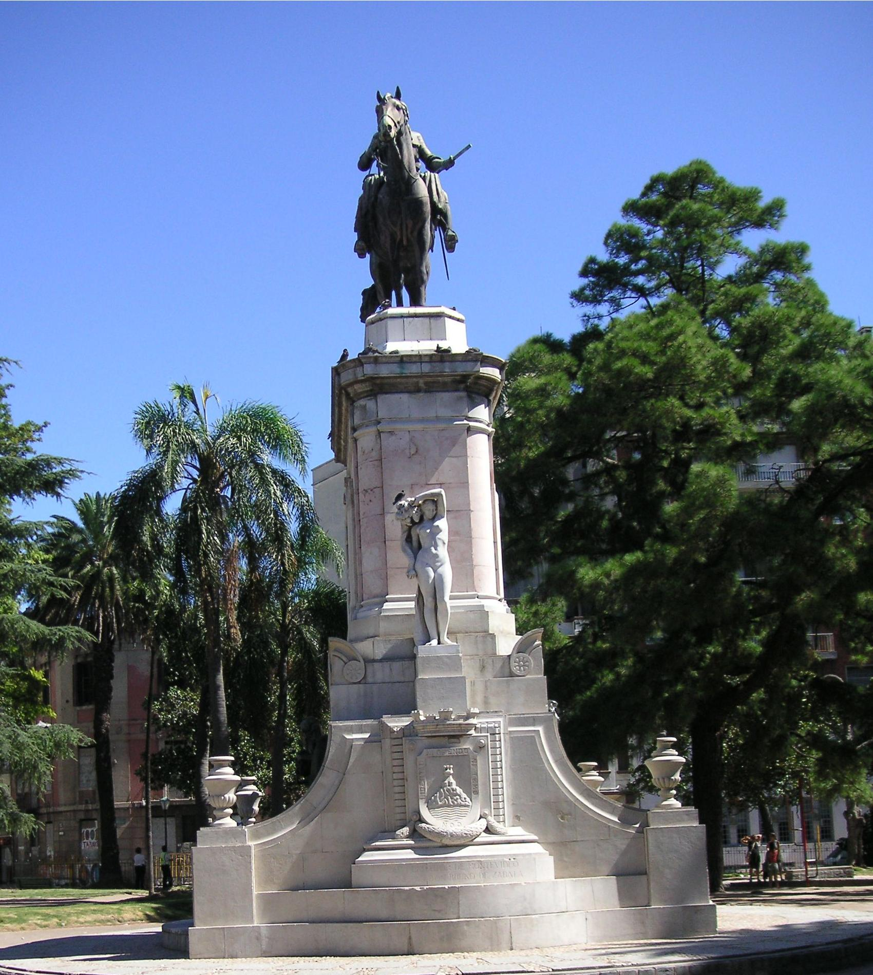 Plaza de Bruno Mauricio de Zabala, colonizador español y fundador de Montevideo en 1726.